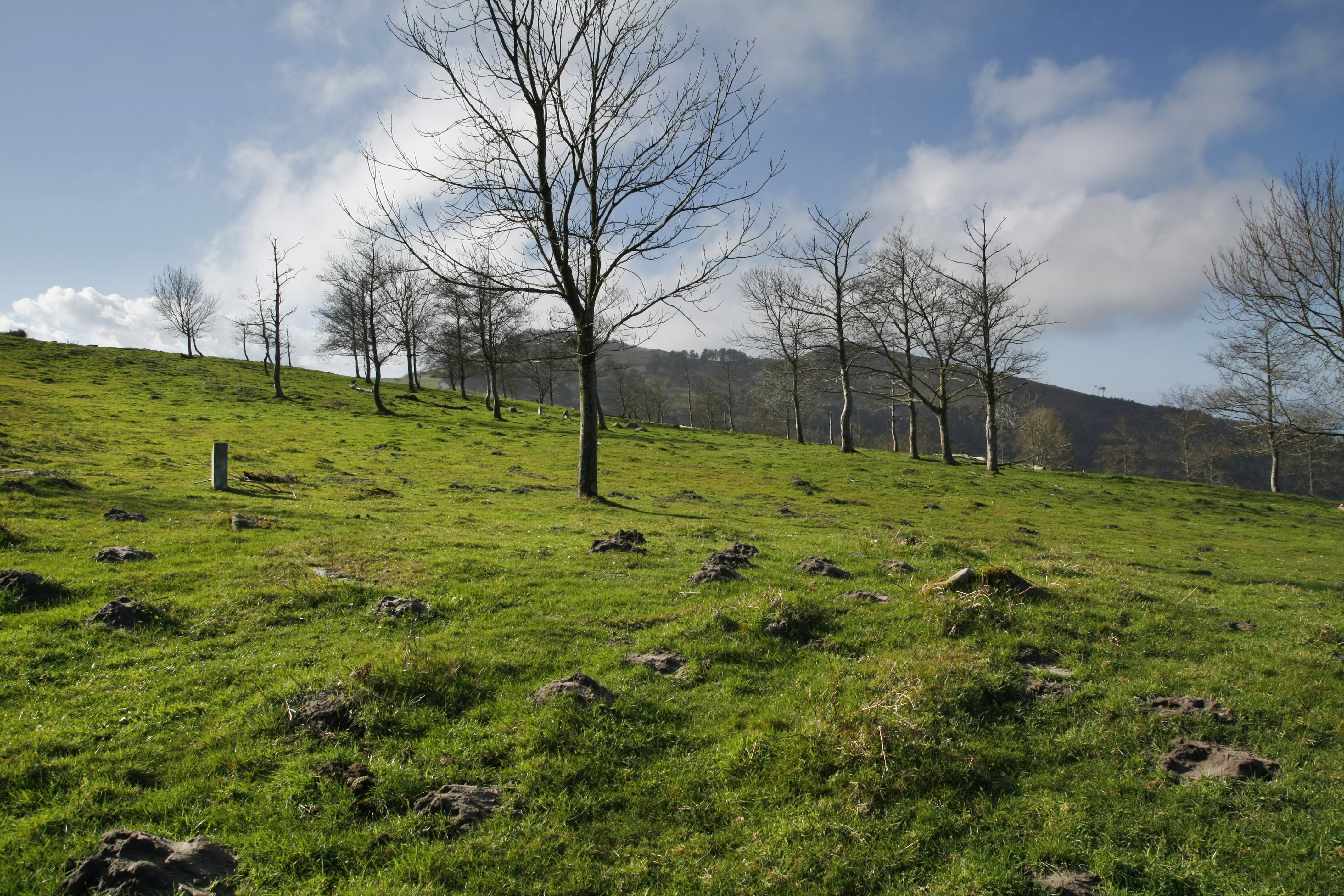 Jaizkibel V harrespila - Hondarribia